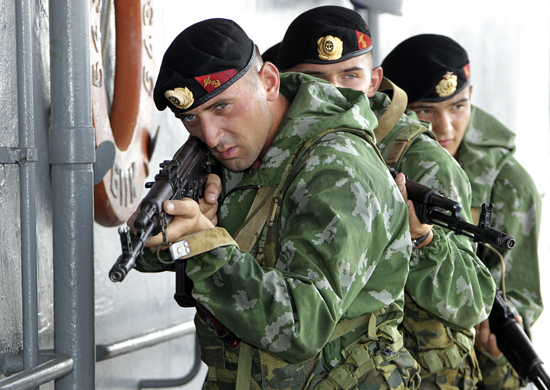 Морская пехота Российской Федерации